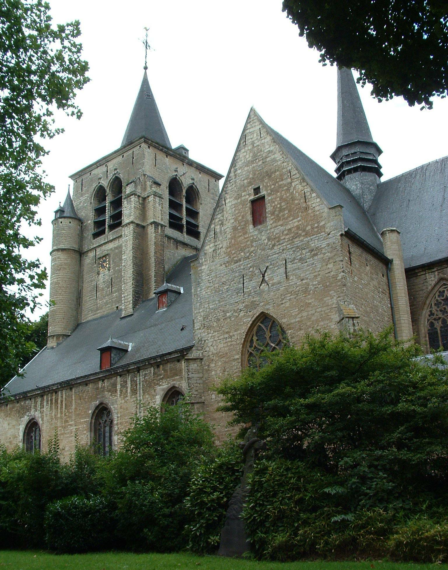 Sint-Pieterskerk, Sint-Pietersleeuw. 02/08/05Sint-Pieters-Leeuw, Flemish Brabant, Belgium